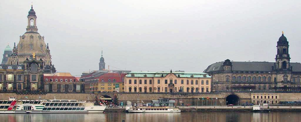 Sekundogenitur in Dresden, an der Brühlschen Terrasse, rechts das Ständehaus, links die Frauenkirche